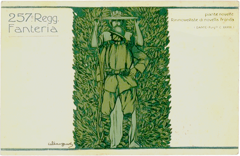 Cartolina militare del 1917 celebrante il 257 rgt della brigata Tortona (ragazzi del '99) con figura e frase su piante novella dalla Divina Commedia canto XXXIII purgatorio